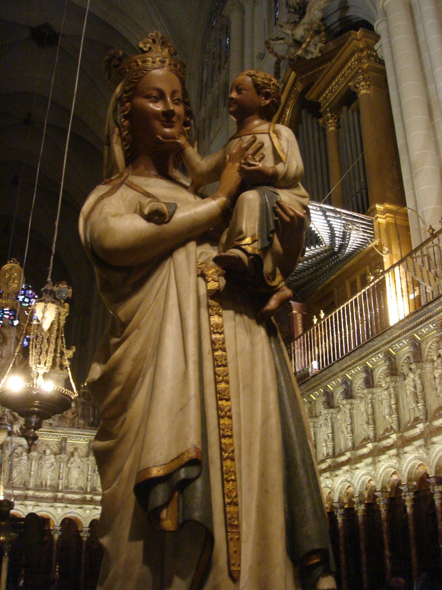 Virgen Blanca en el Coro de la Catedral de Toledo, España.